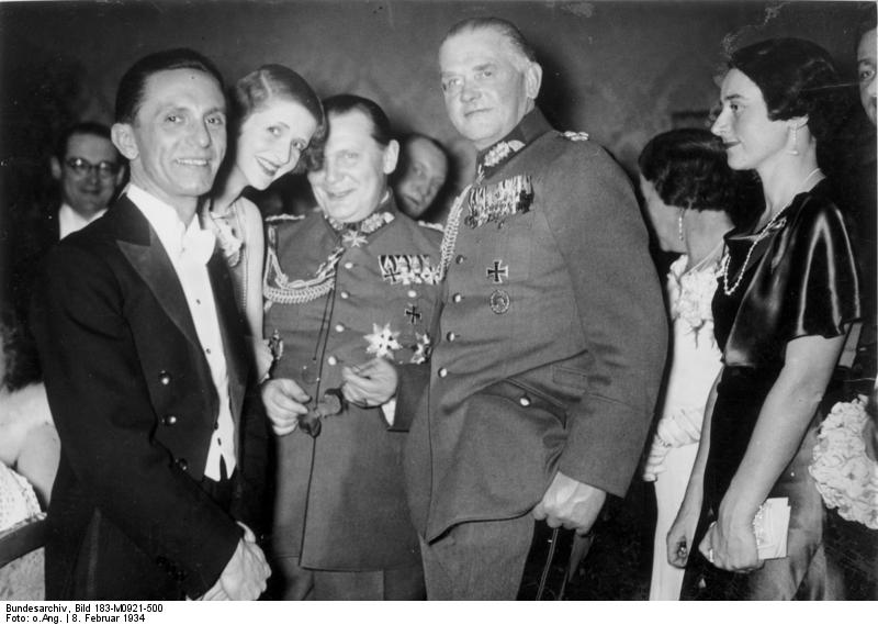 ADN-ZB/Archiv Im faschistischen Deutschland 1934 Berlin: Führende Hitlerfaschisten auf dem Presseball am Zoo: Reichspropagandaminister J. Goebbels (links), Ministerpräsident H. Göring (Mitte), Reichswehrminister W.v. Blomberg (r). 4385-34